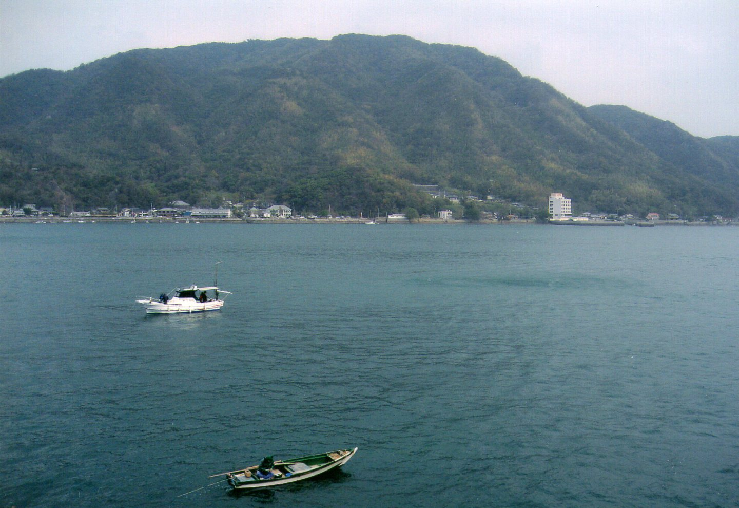 天草・苓北・2006・12・02